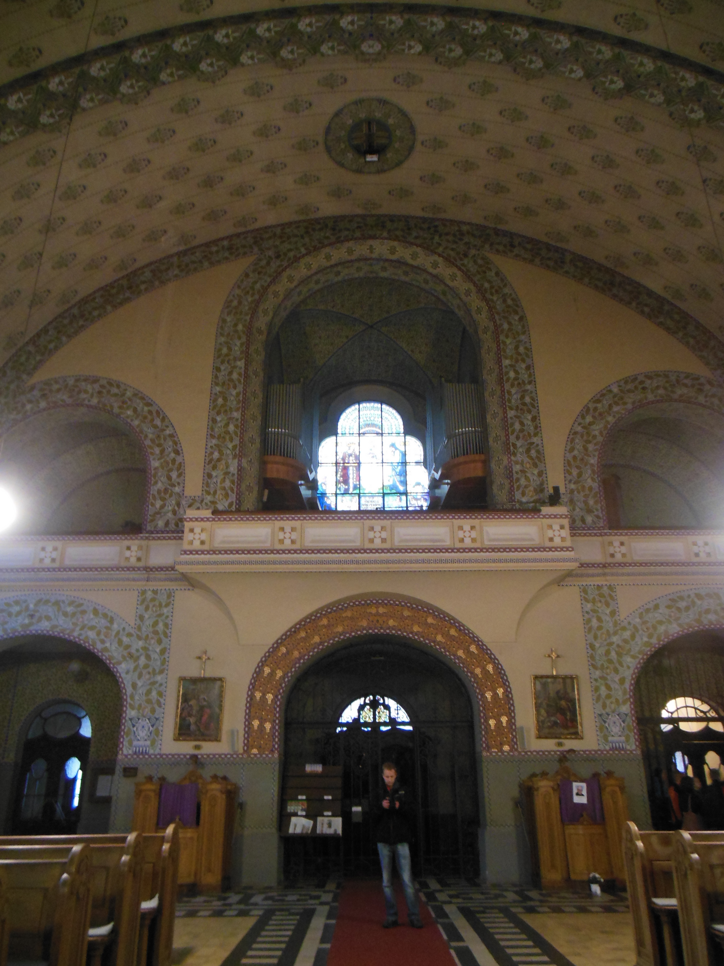 Brno-Trnitá. Ulice Křenová, kostel Neposkvrněného Početí Panny Marie, kůr.